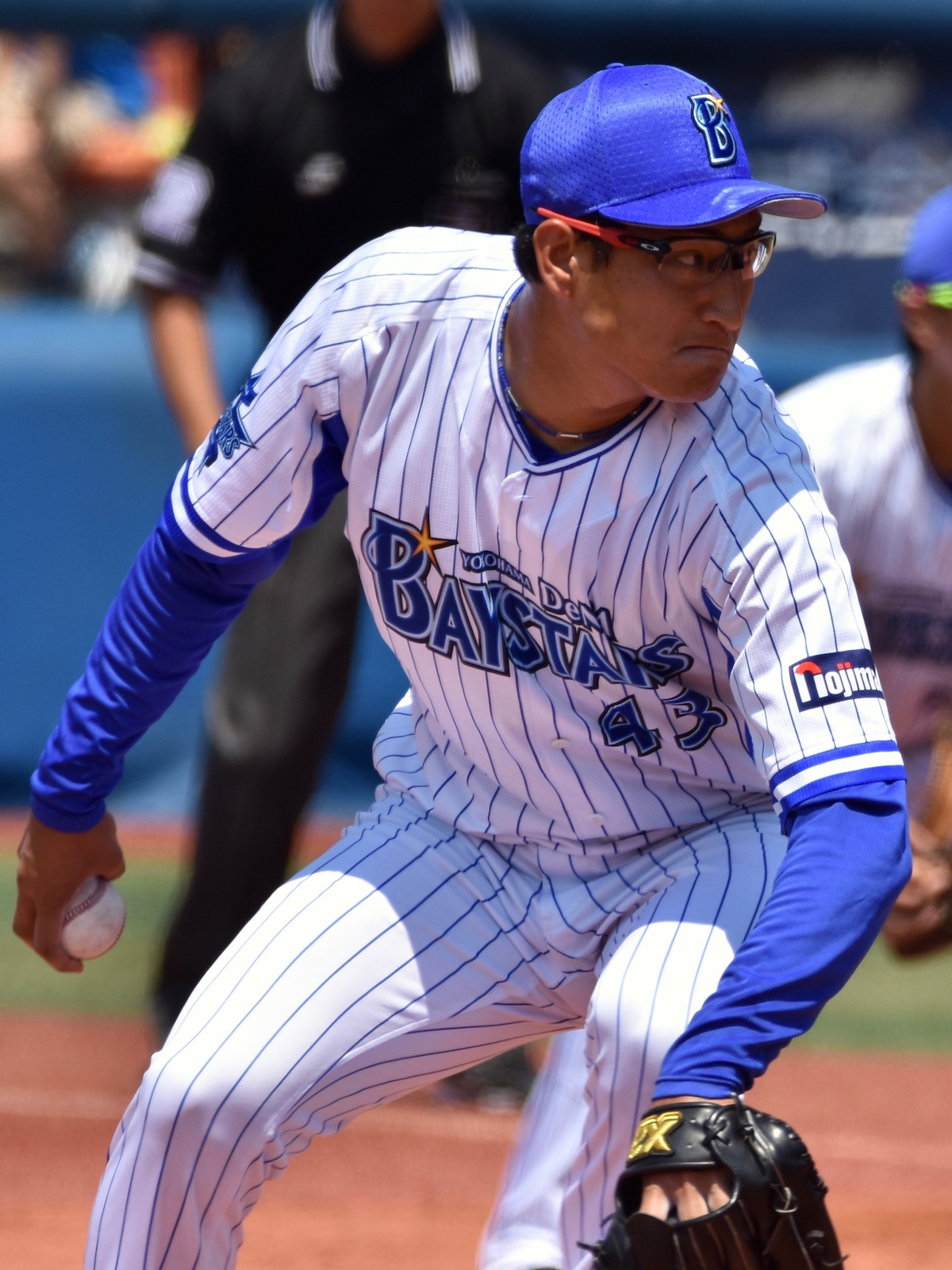 2017年6月16日、横浜スタジアムにて撮影